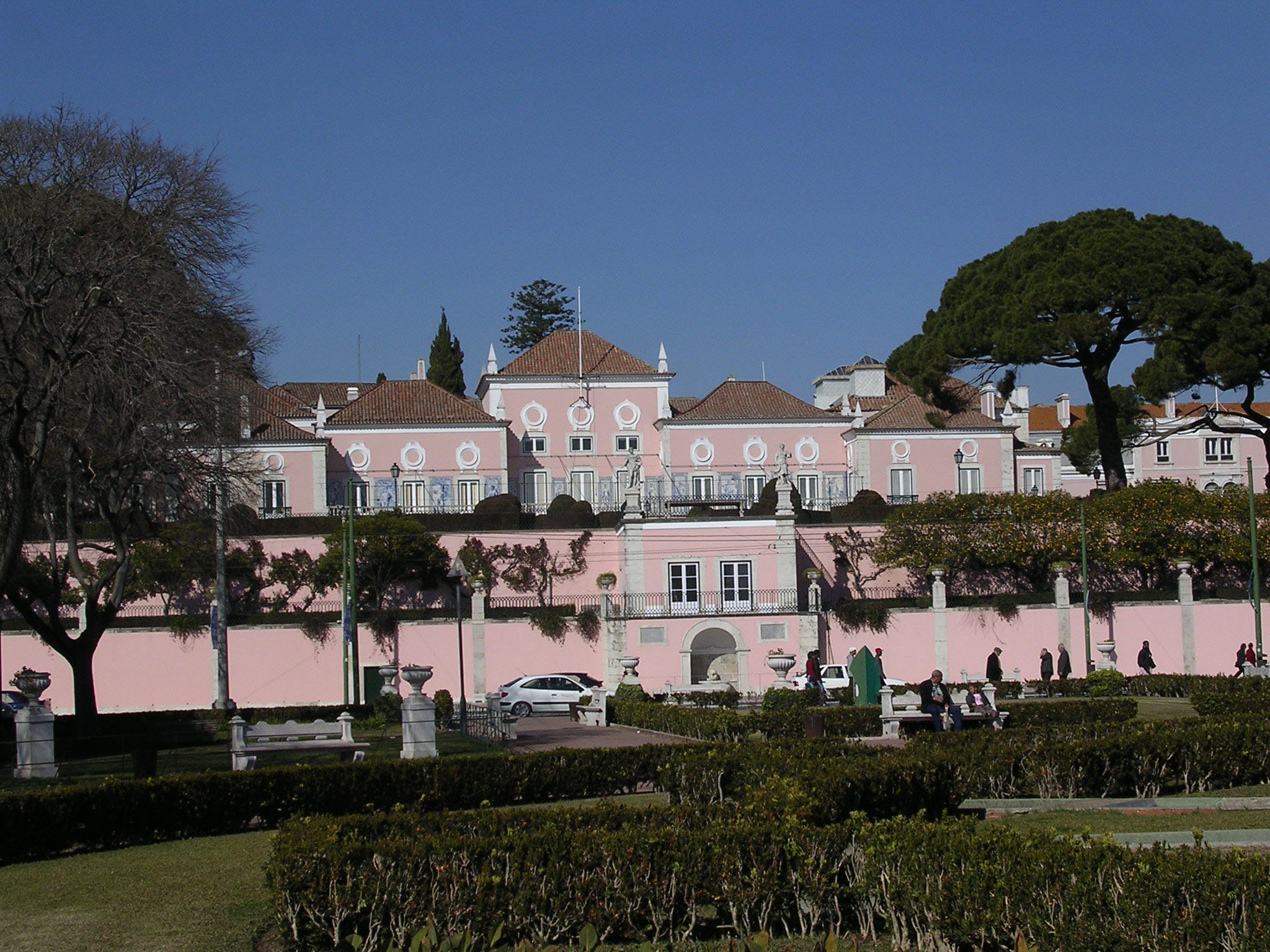 Portugal